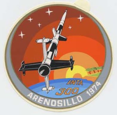 Logo de la Misión INTA 300